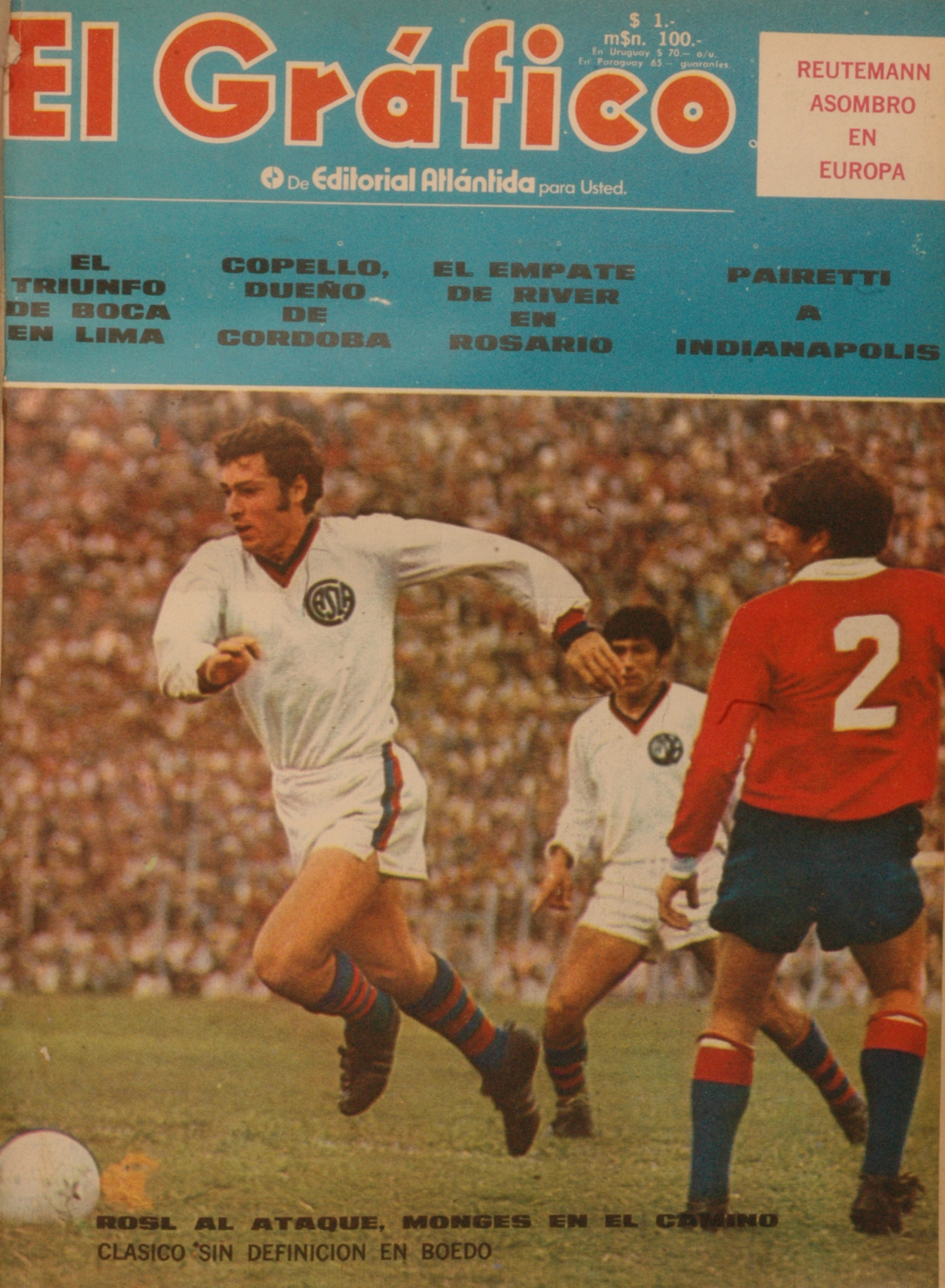 El Grafico del 14 de Abril de 1970. Edicion 2636